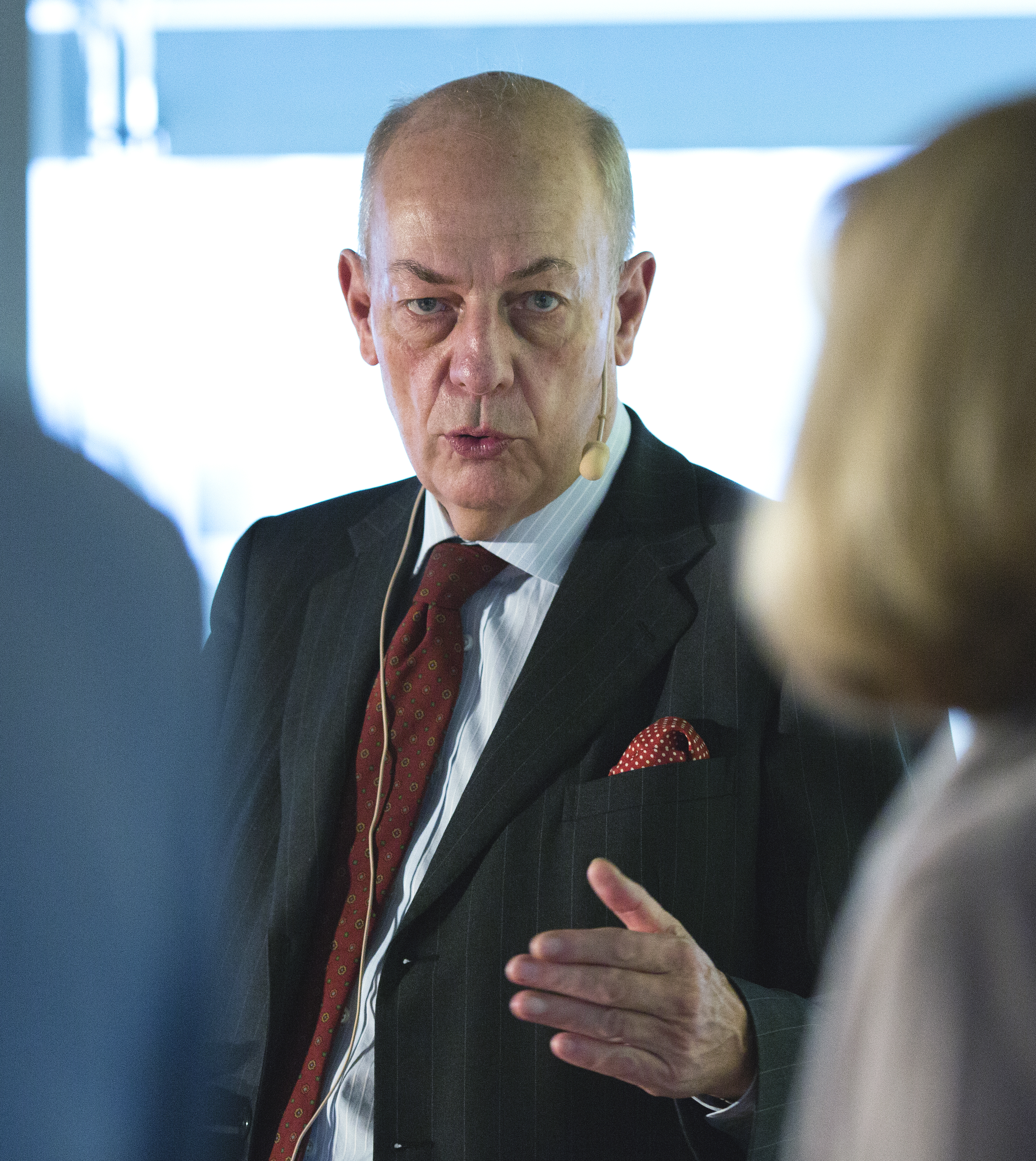 Peter Honeth, svensk stadssekreterare för högre utbildning och forskning, vid ett möte på Medicon Village i Lund 20121116. Foto: News Øresund – Johan Wessman. © News Øresund. Bilden får fritt publiceras under förutsättning att källa anges (Foto: News Øresund + fotografnamn). (The picture can be used freely under the prerequisite that the source is given. ) Originalfil tillhandahålles gratis, kontakta: News Øresund, Malmö, Sweden. News Øresund är en oberoende regional nyhetsbyrå som ingår i projektet Øresund Media Platform som drivs av Øresundsinstituttet i partnerskap med Lunds universitet och Roskilde Universitet och med delfinansiering från EU (Interreg IV A Öresund) och 14 regionala, icke kommersiella aktörer.